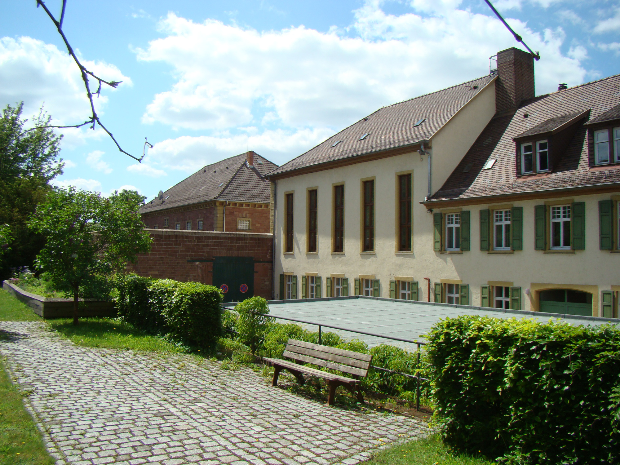 Franziskanerkloster Mosbach: Amts- und Landgerichtsgebäude, ehemaliger Klosterbau, links davon das Gefängnis an der Stelle der einstigen Klosterkirche